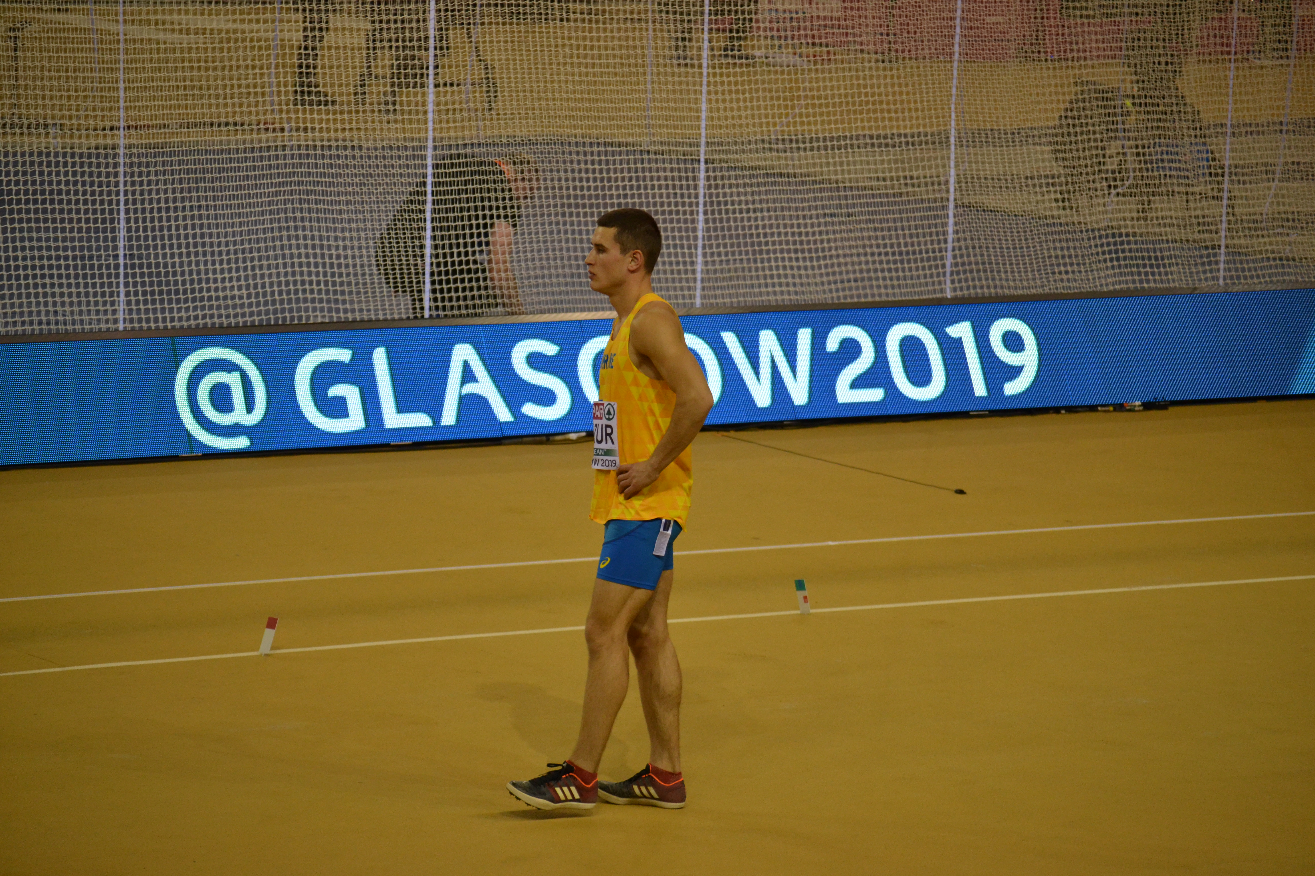 Mens Long Jump